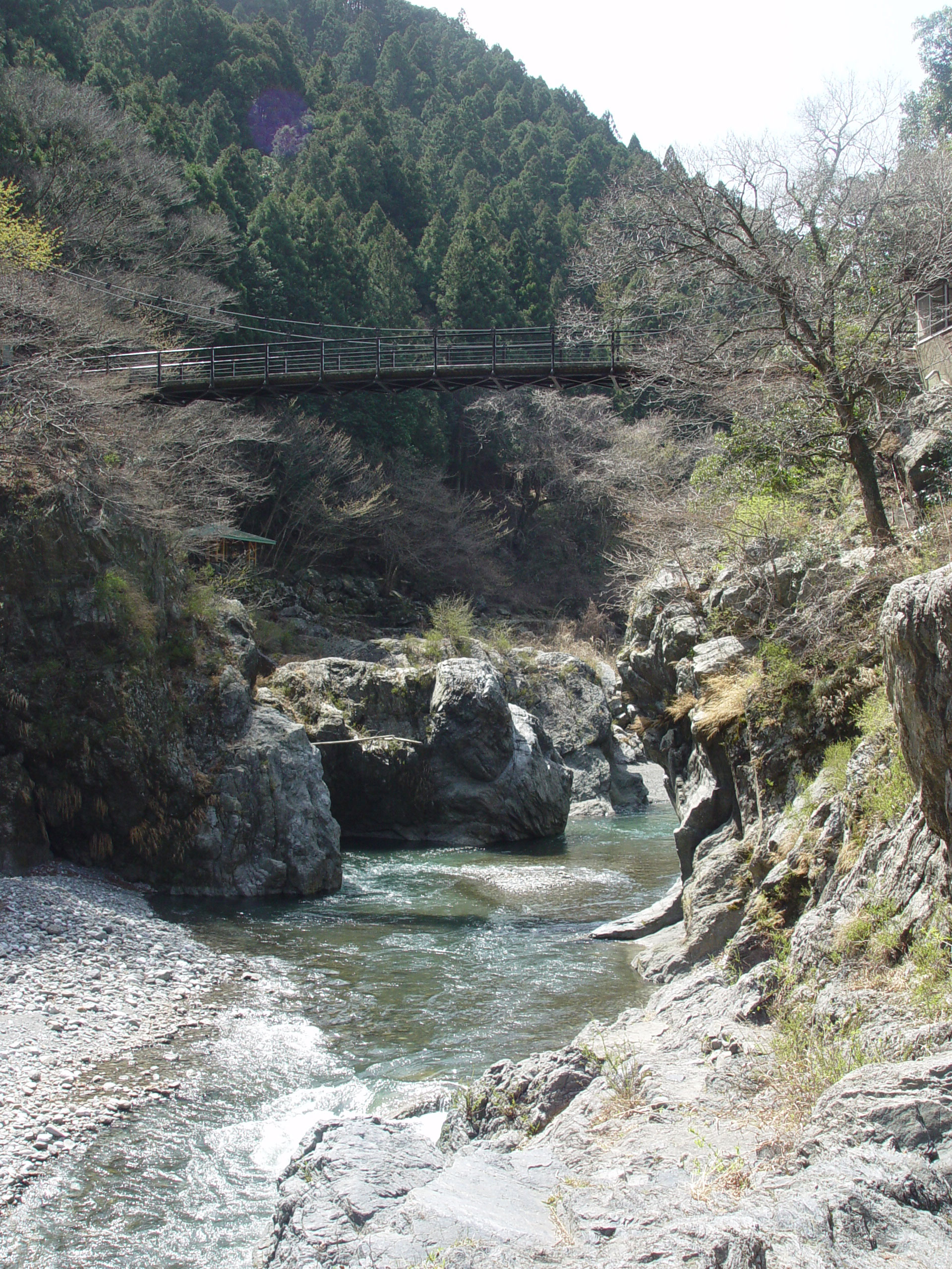 Hatonosu Kobashi Bridge ja: 鳩ノ巣小橋、鳩ノ巣渓谷、多摩川